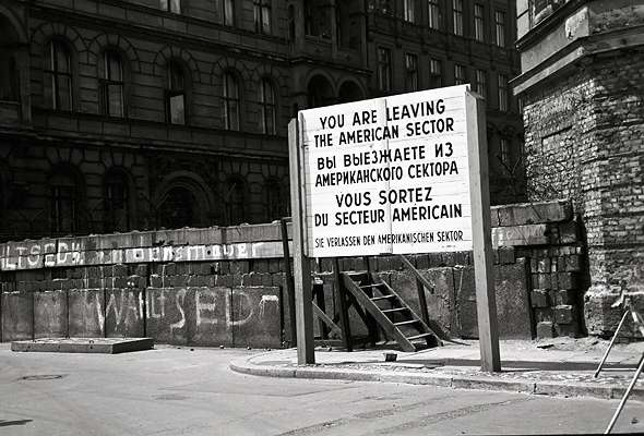 Berliner Mauer: Amerikanisches Sektorenschild an der Sebastianstraße, Ecke Luckauer Straße.